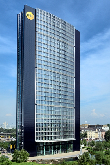 Der ARAG Tower in Düsseldorf